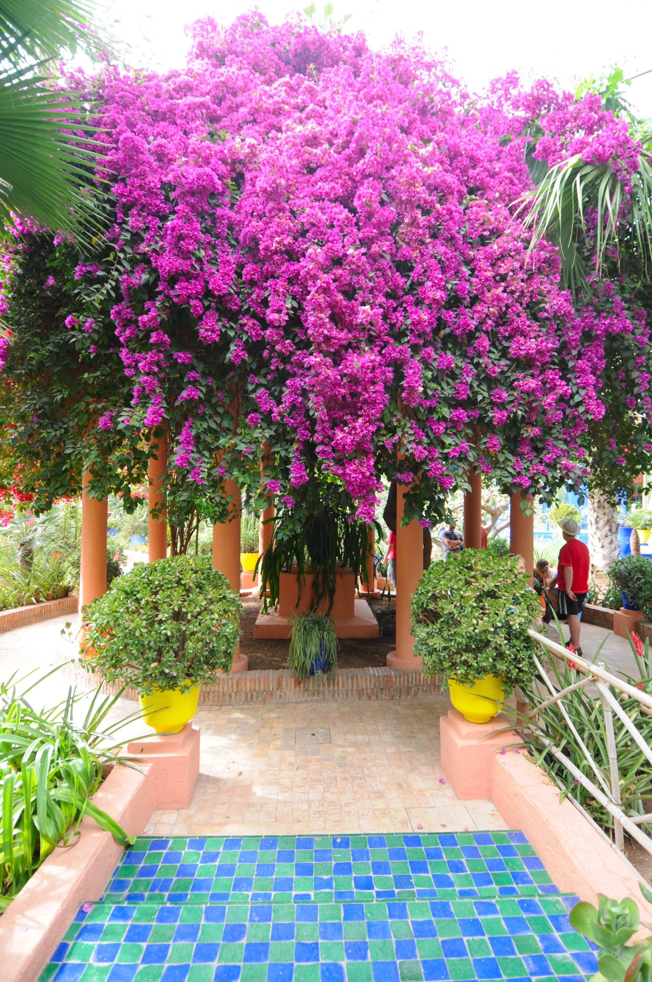 Le jardin Majorelle, Marrakech, Maroc